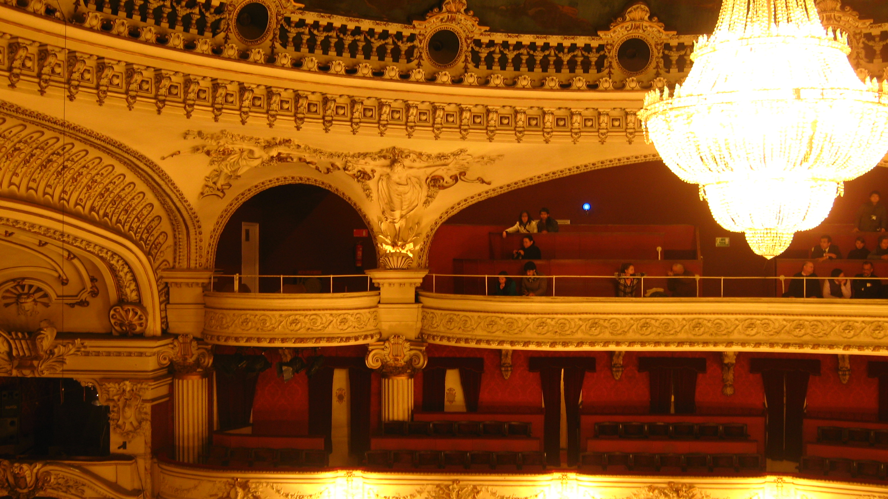 Teatro Municipal de Santiago: El mejor lugar para la cultura y las artes. This is a photo of a national monument in Chile: 208